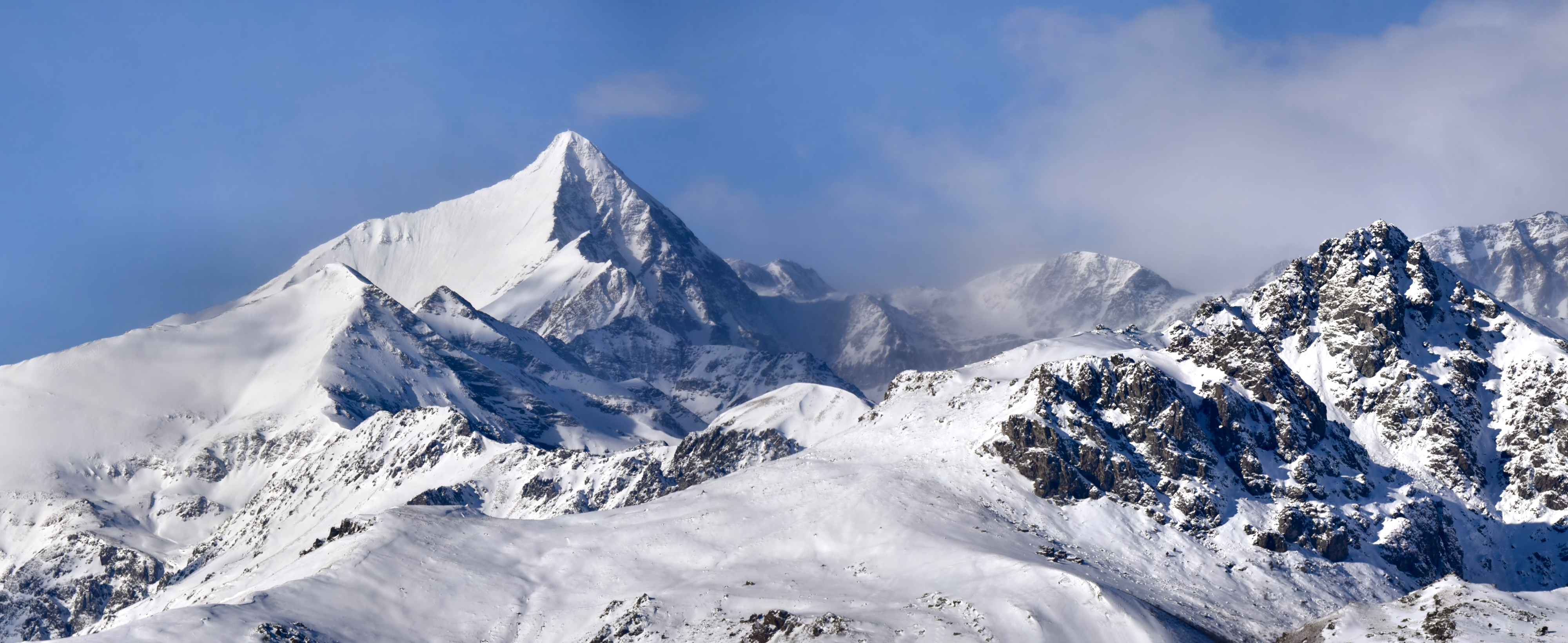 Rocciamelone (Q49964120)